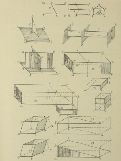 Страница из армянской редакции "Начал" Евклида. Рукопись XVII века.